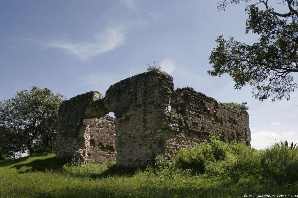 Totolac, Tlaxcala Foto: J. Guadalupe Pérez /2014